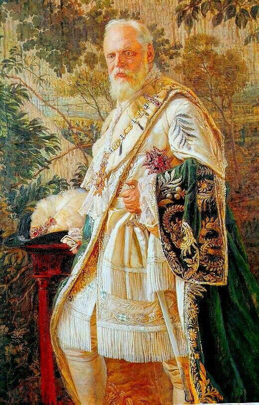 König Ludwig III. von Bayern